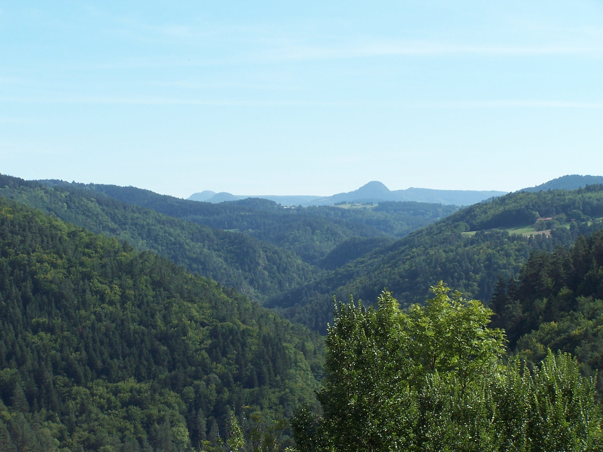 La vallée du Ramel (en fond les sucs d'Yssingeaux), au niveau du Fraisse-Haut sur la commune de Beauzac en Haute-Loire, France.